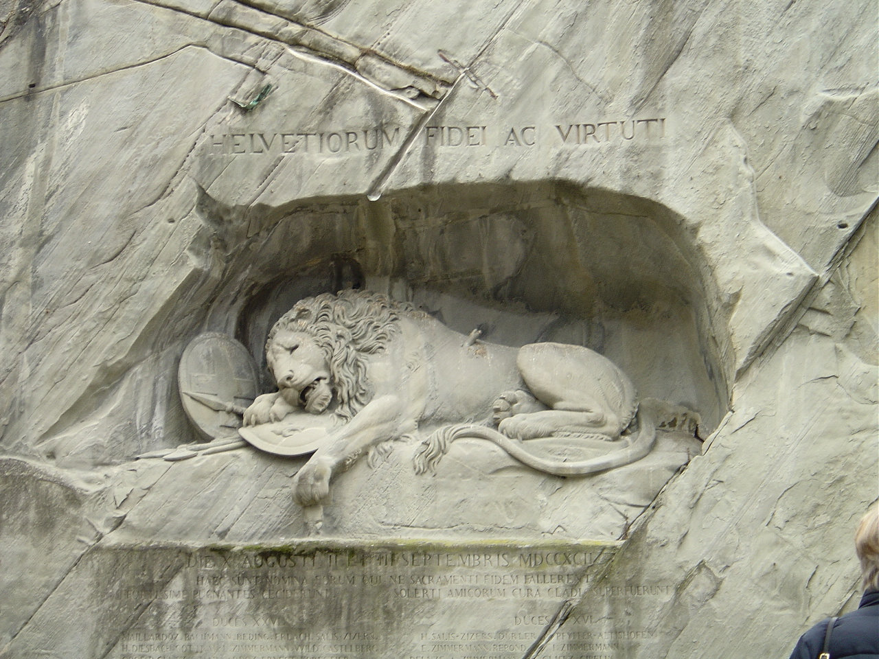 盧塞恩垂死的獅子像。